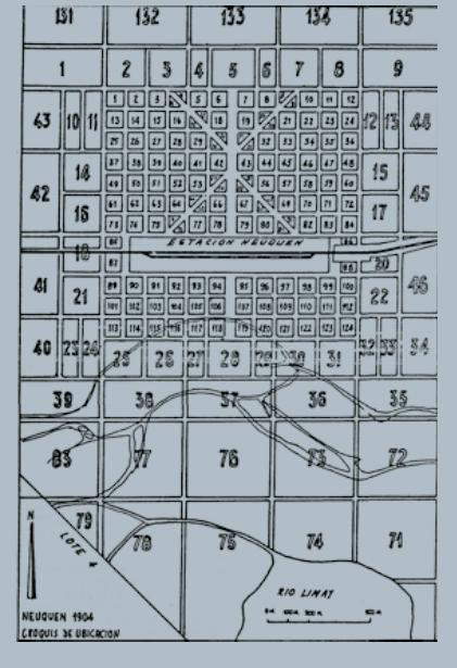 Plano del proyecto de amanzanamiento del la ciudad de Neuquén. Incluye brazos del río Limay. Año: 1904.